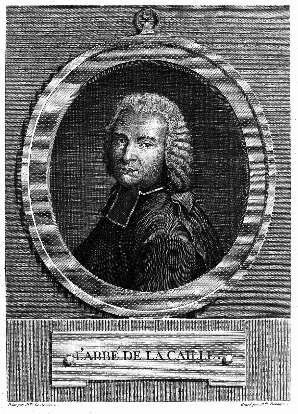 Nicolas Louis de La Caille. Line engraving by Thérèse Devaux after Mlle Le Jeuneux. Iconographic Collections Keywords: Nicolas Louis de La Caille